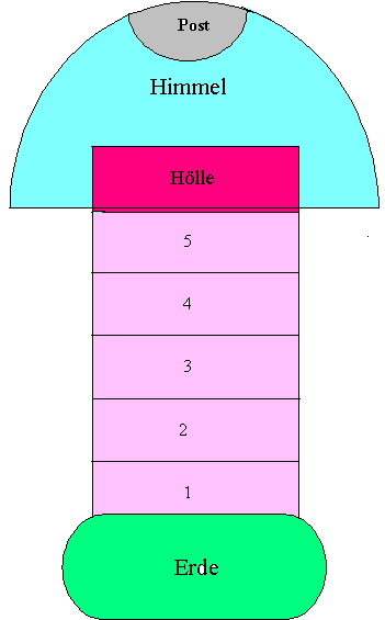 Source:selbst erstellt am 11.3.05, Lizenz GNUFDL, Bild: Hickelkasten, Himmel und Hölle Variante = Hopscotch Lizenz